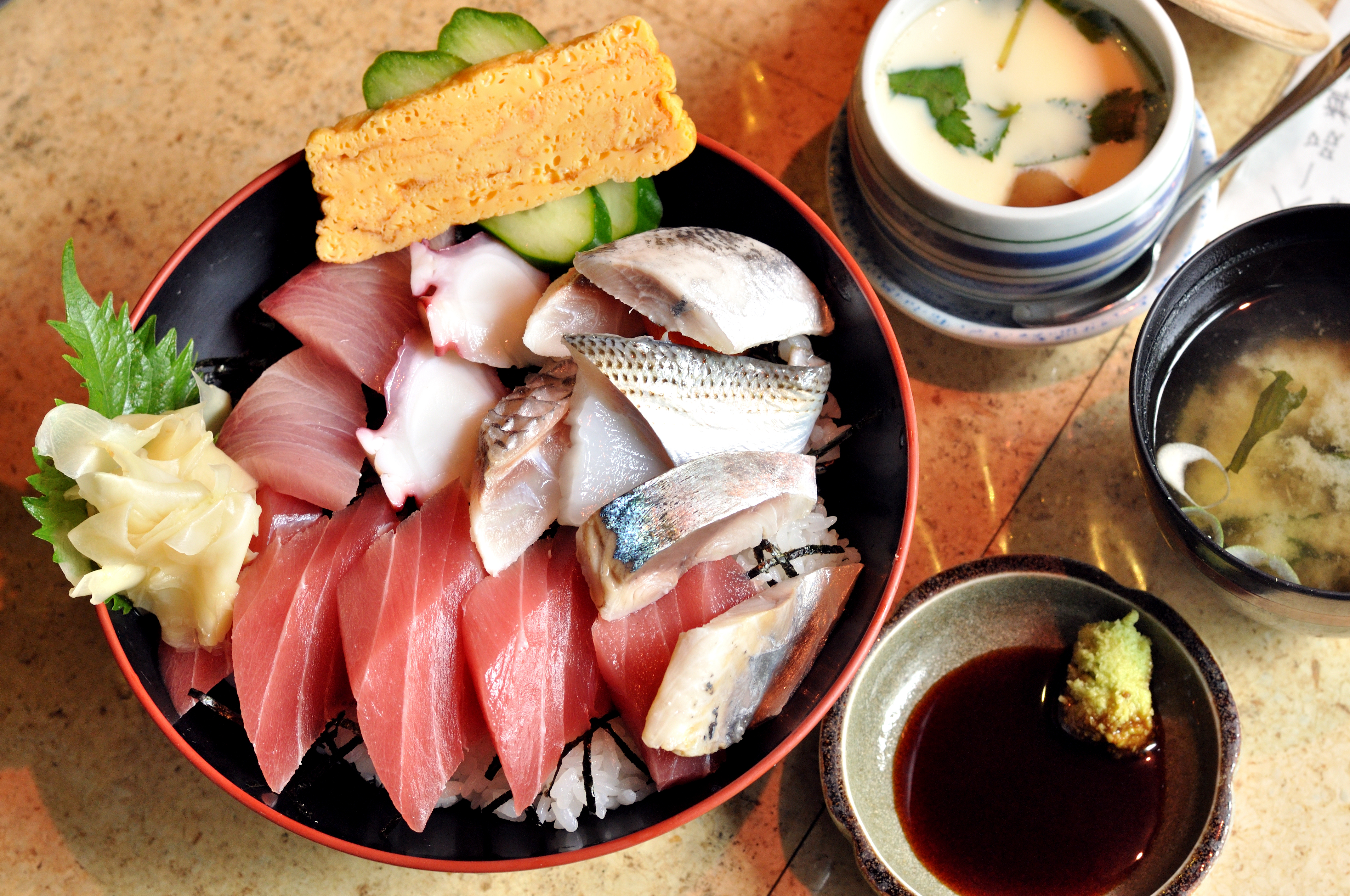 典型的な海鮮丼の例